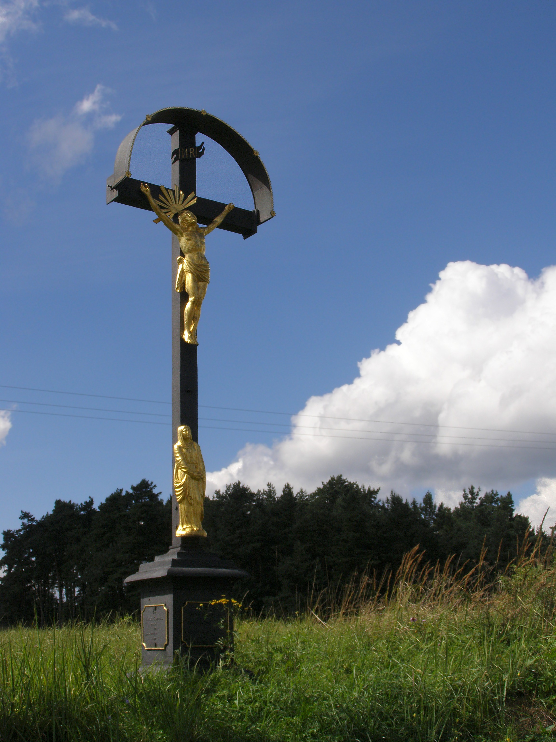 Cizkrajov, část Mutná, kříž u cesty mezi Mutnou a Cizkrajovem